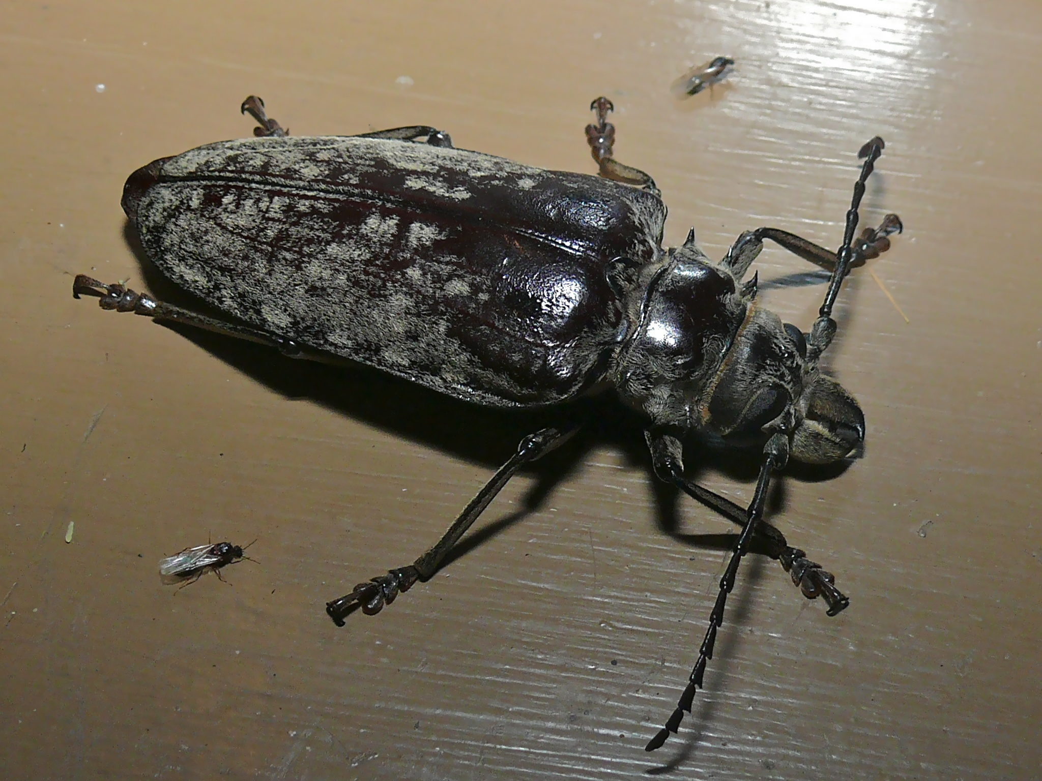 Letaba Camp, Kruger NP, SOUTH AFRICA